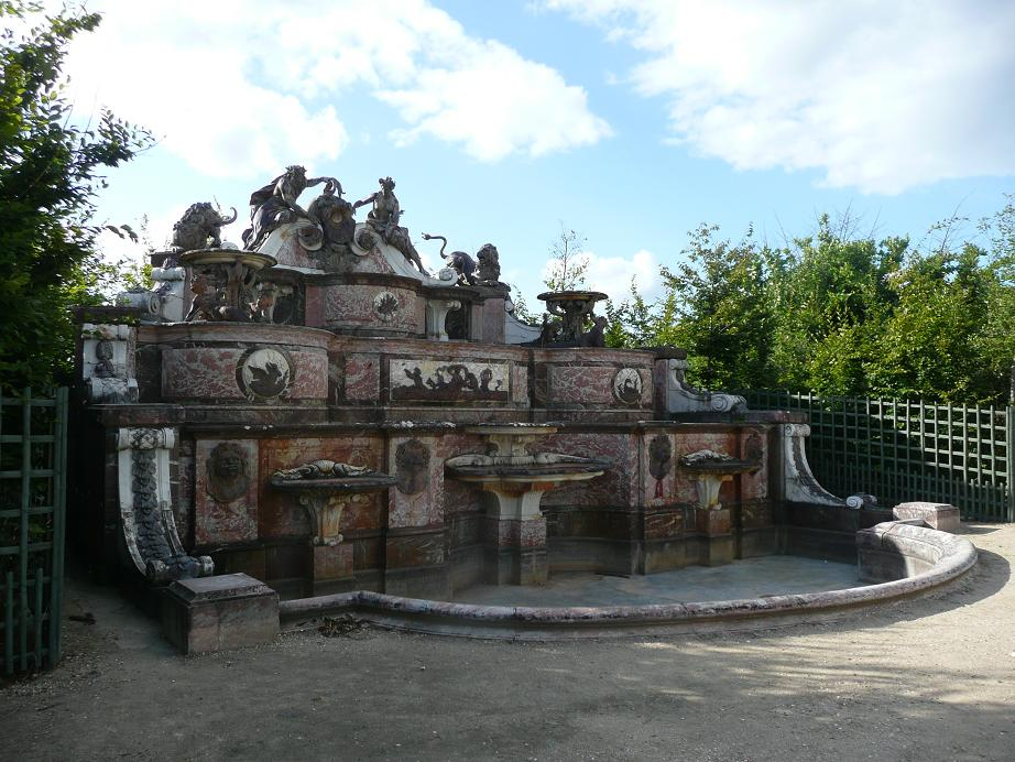 Fontaine Le buffet d’Eau construite par Jules Hardouin-Mansart en 1703 et ornée de plombs sculptés par Mazière, Le Lorrain, Hardy, Poirier et Van Clève - jardins du Grand Trianon, château de Versailles.